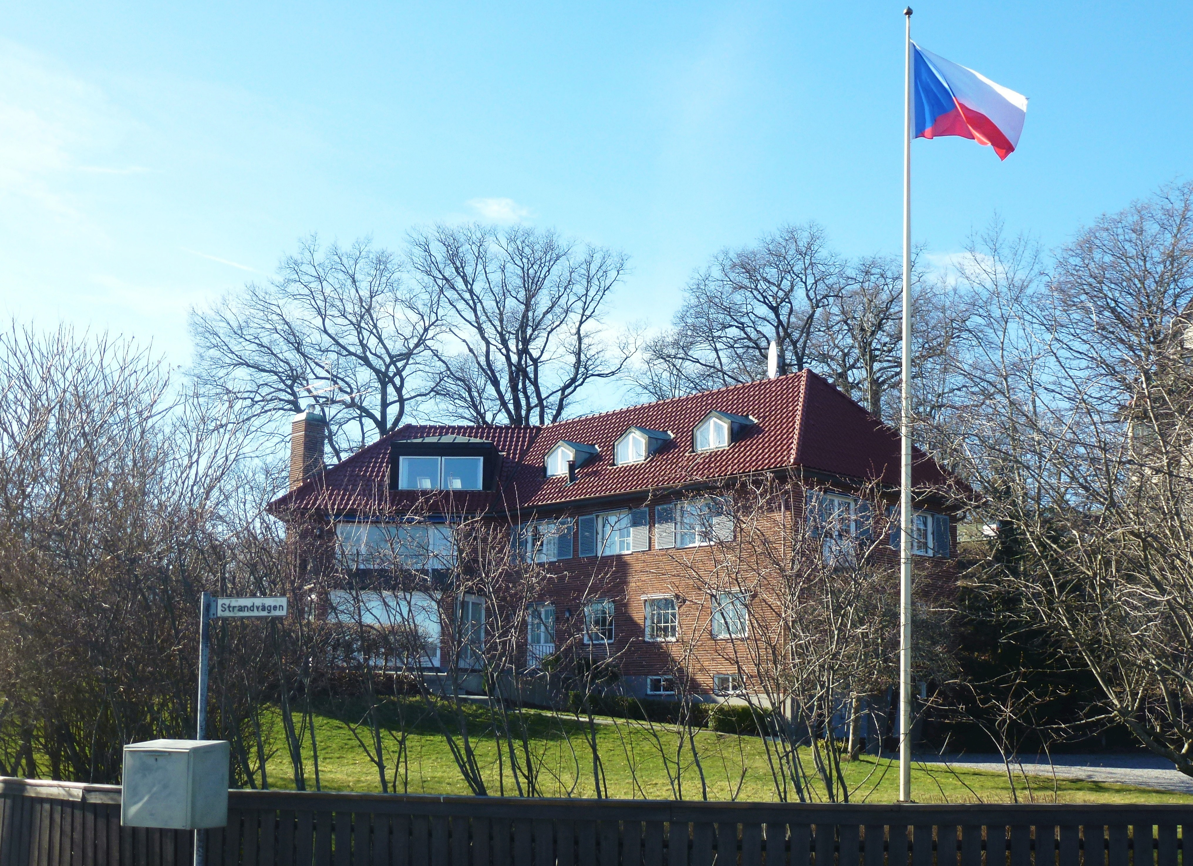 Tjeckiska residenset, Strandvägen 1, Djursholm